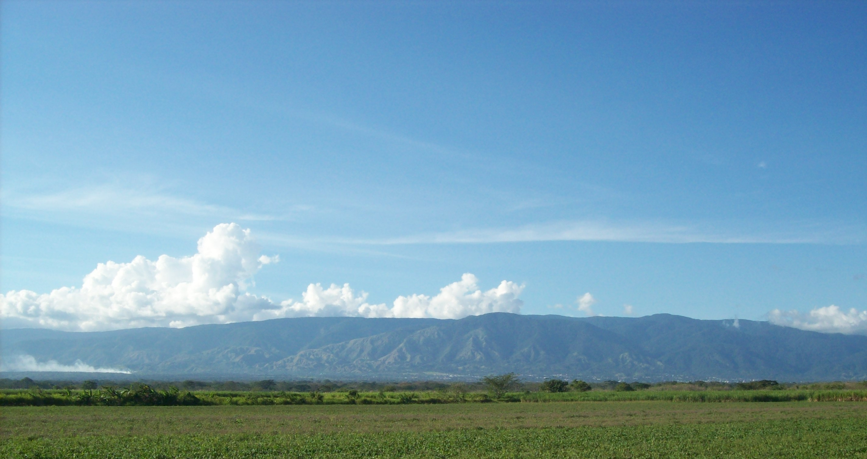 Macizo_aroeño_desde_Santa_María